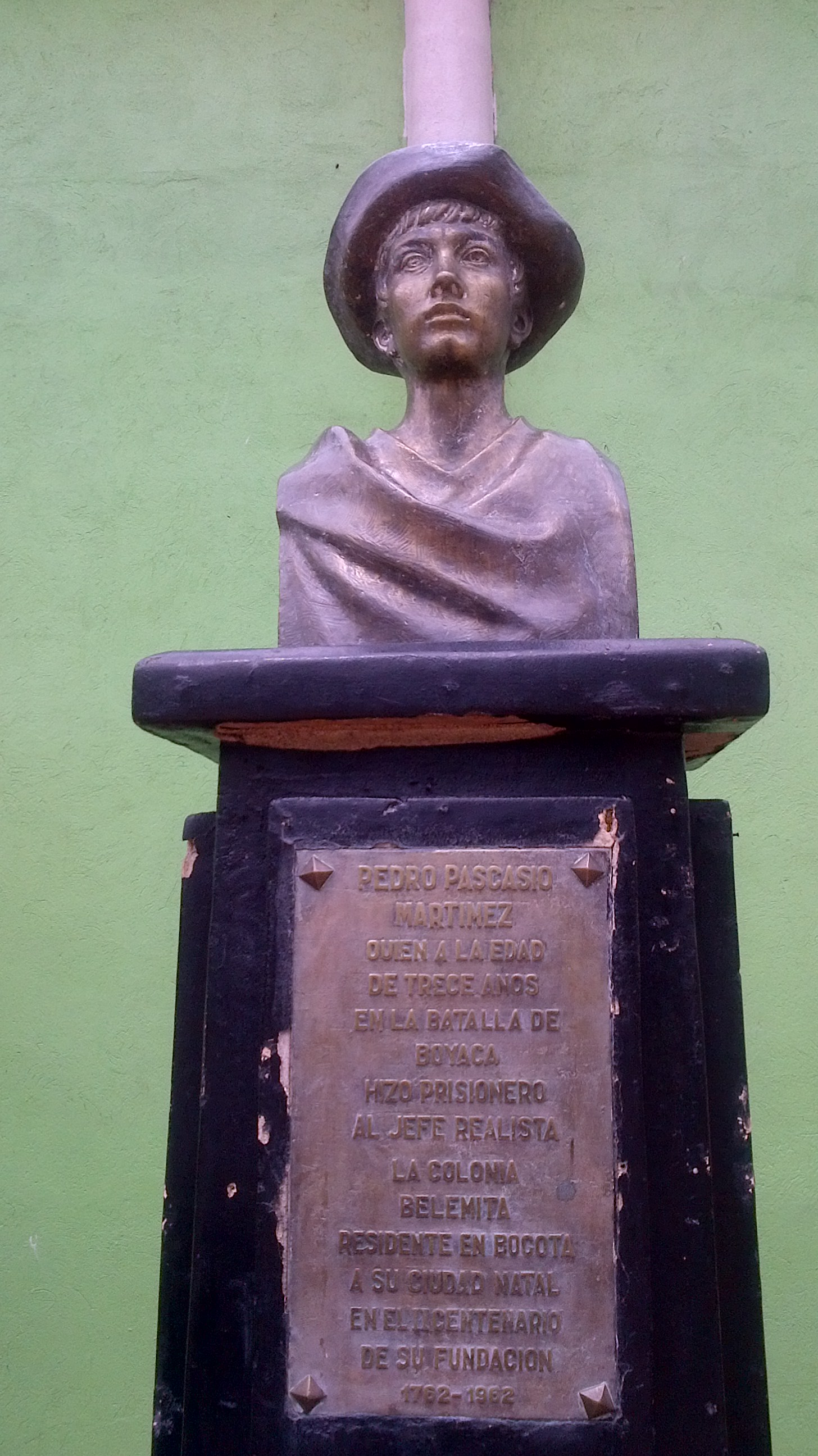 Busto al heroe de la independencia Pedro Pascacio Martinez